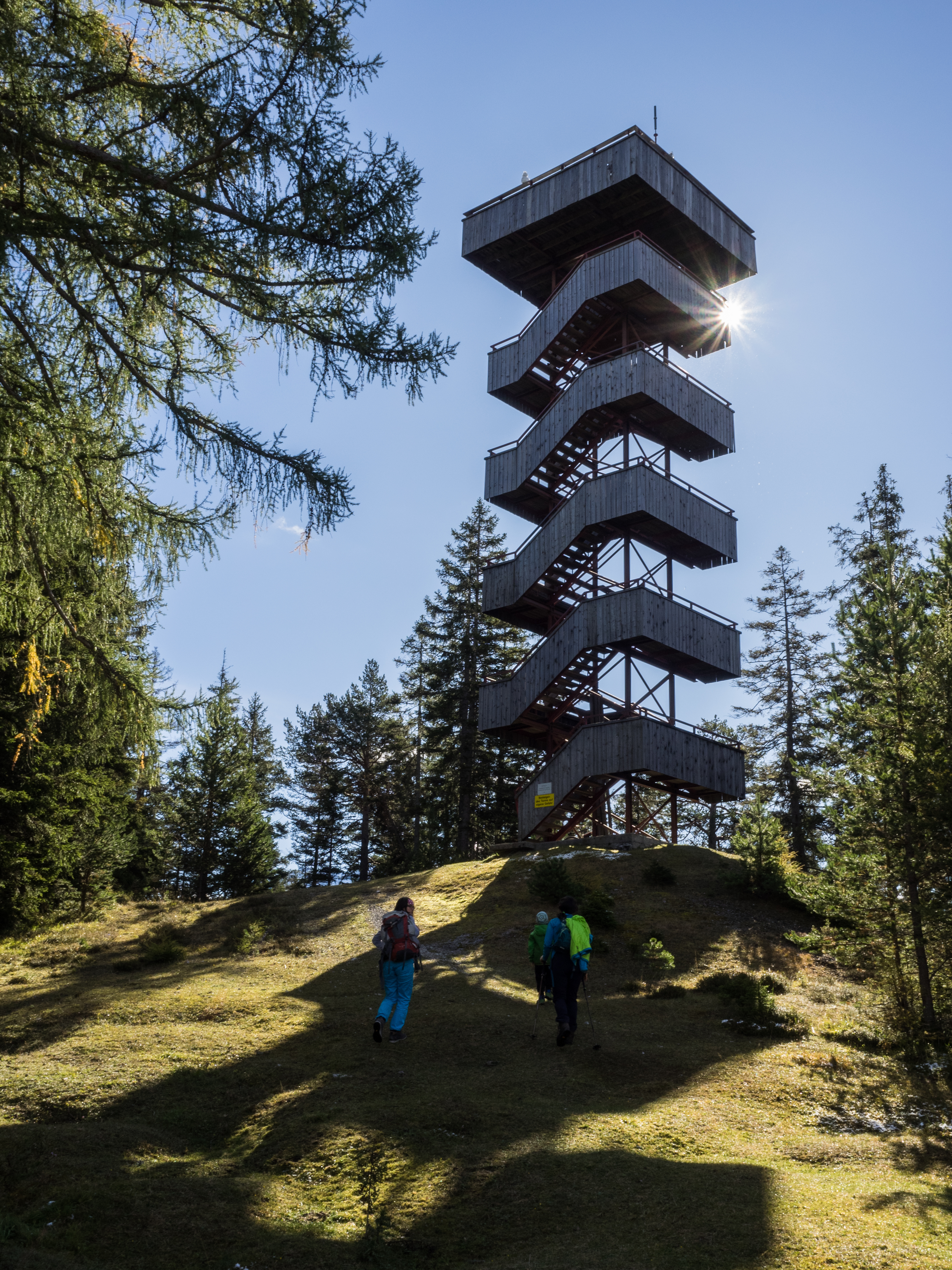 Aussichtsturm am Grünberg zwischen Silz und Obsteig